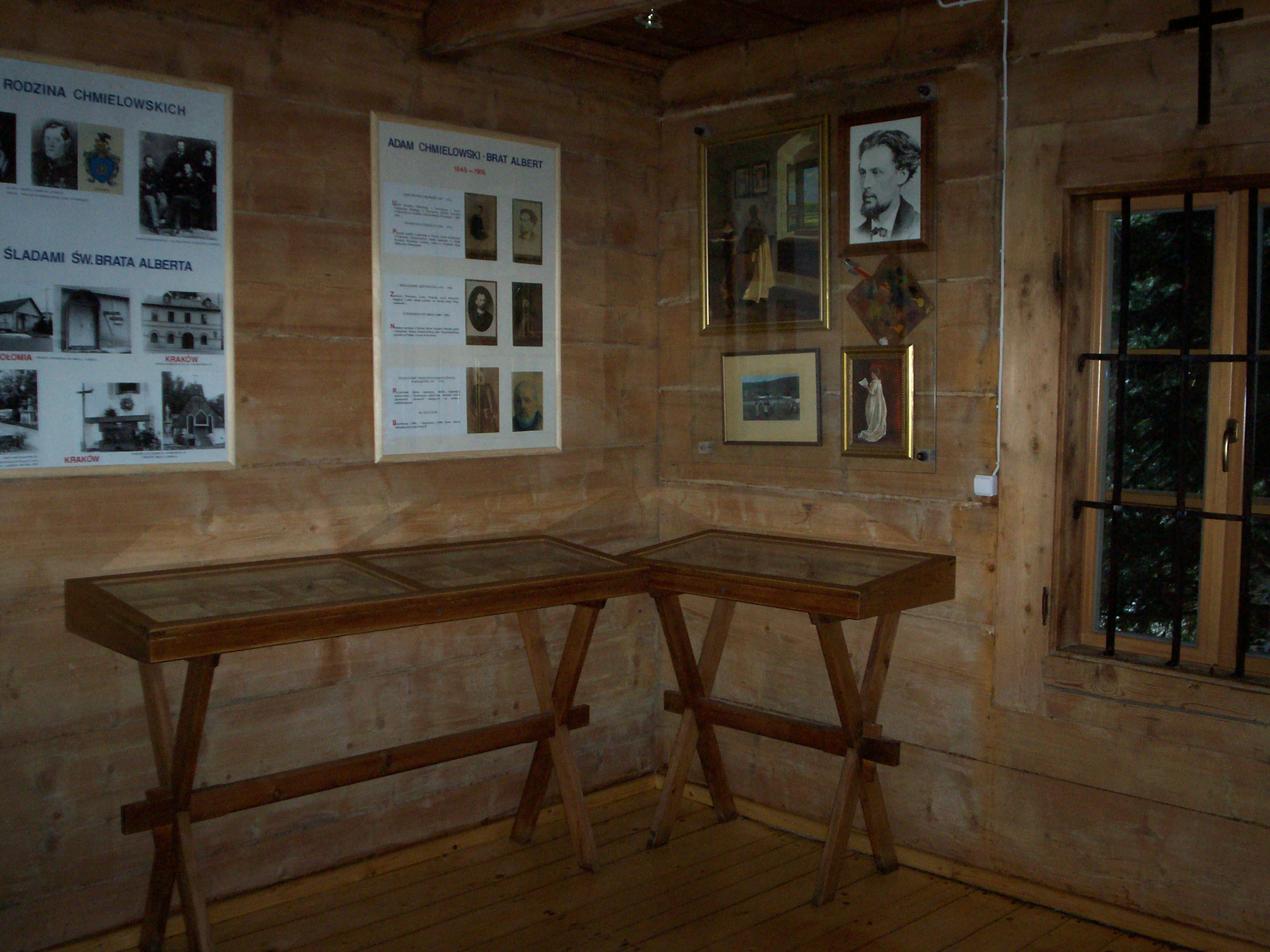 Zakopane, wnętrze Chatki Św. Brata Alberta przy klasztorze sióstr Albertynek na Kalatówkach.